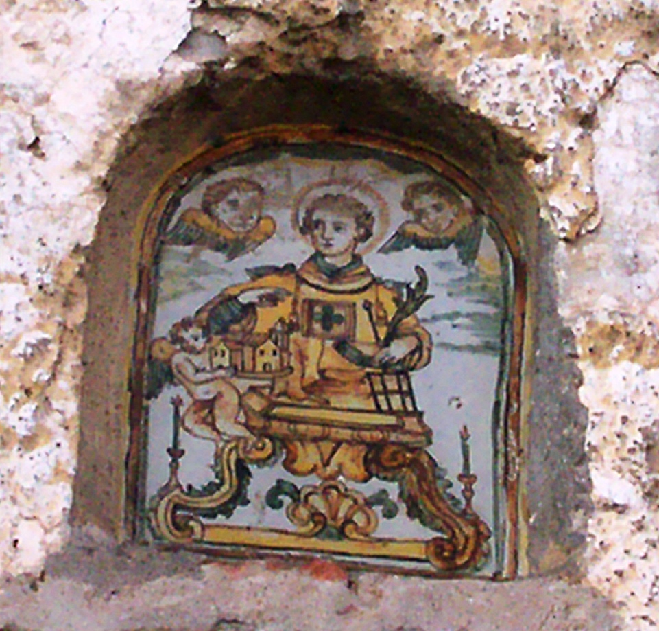 Edicola in ceramica cerretese del XVIII secolo raffigurante San Lorenzo Martire. L'edicola è sita sulla facciata di una antica bottega di ceramisti nella "Insula dei faenzari", all'interno del quartiere dei ceramisti che nacque a Cerreto Sannita nei pressi della Cattedrale subito dopo il terremoto del 1688.